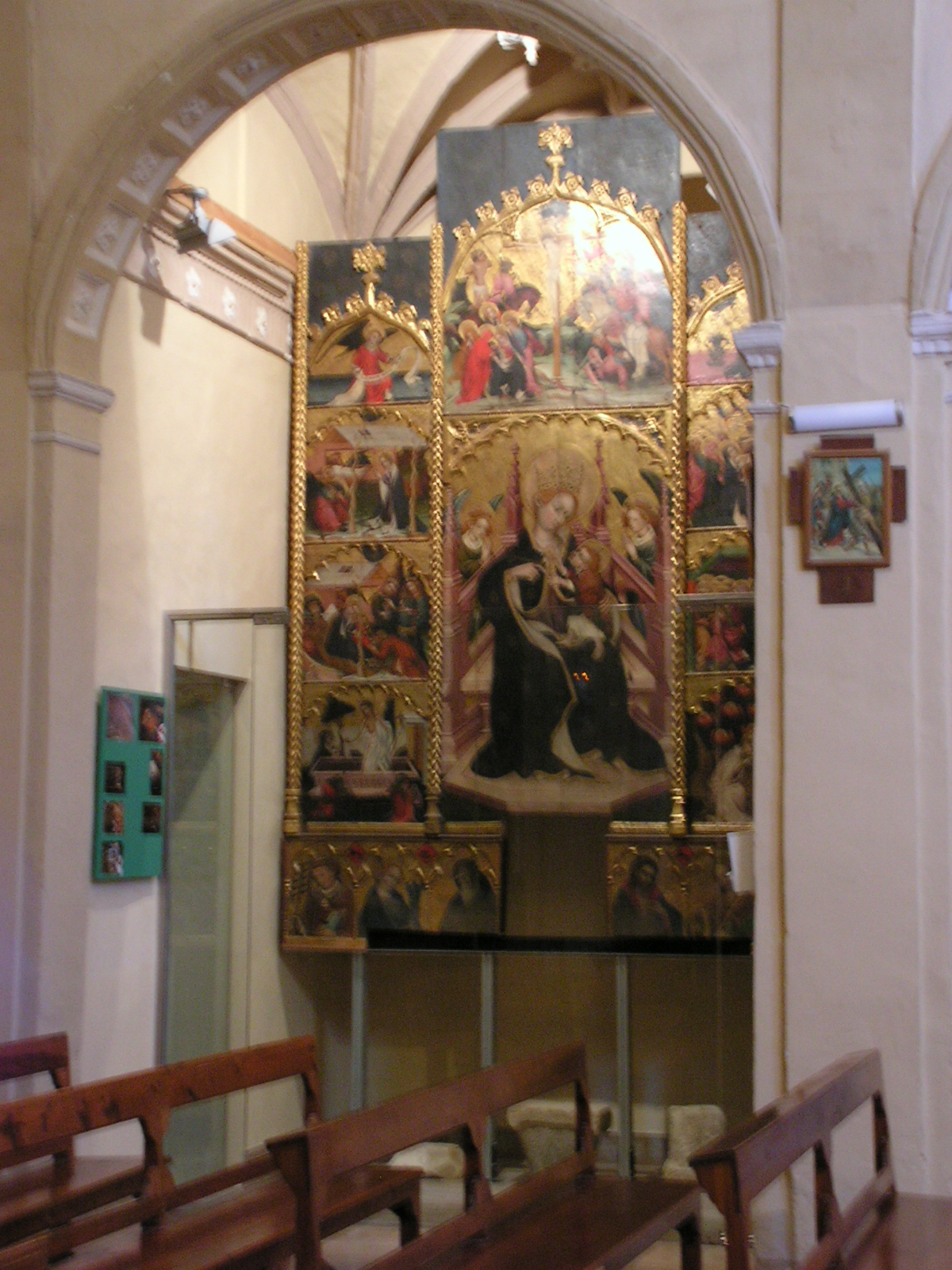 Església de la Nativitat de la Mare de Déu (Cabacés)